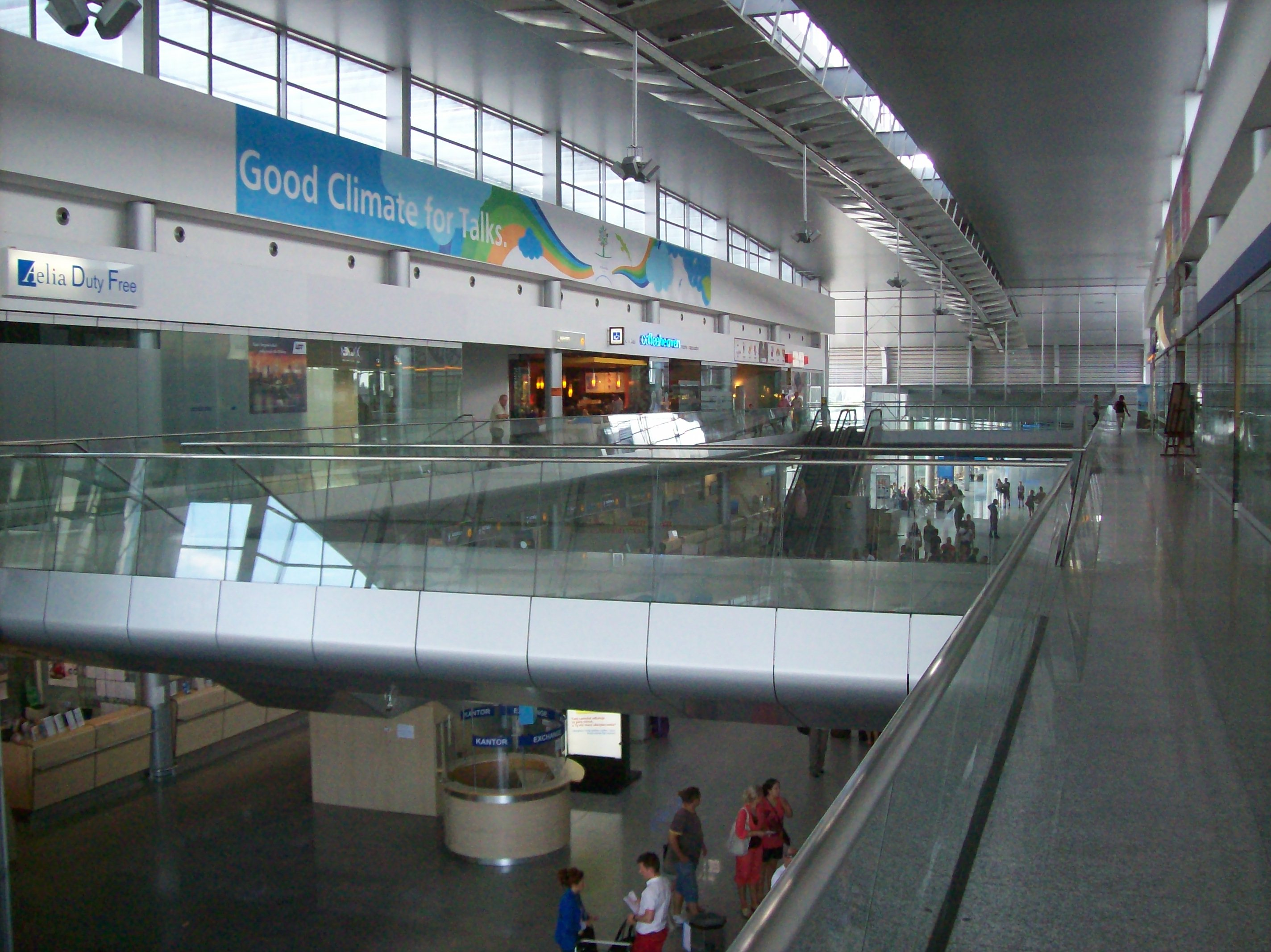 Terminal pasażerki Poznań-Ławica.